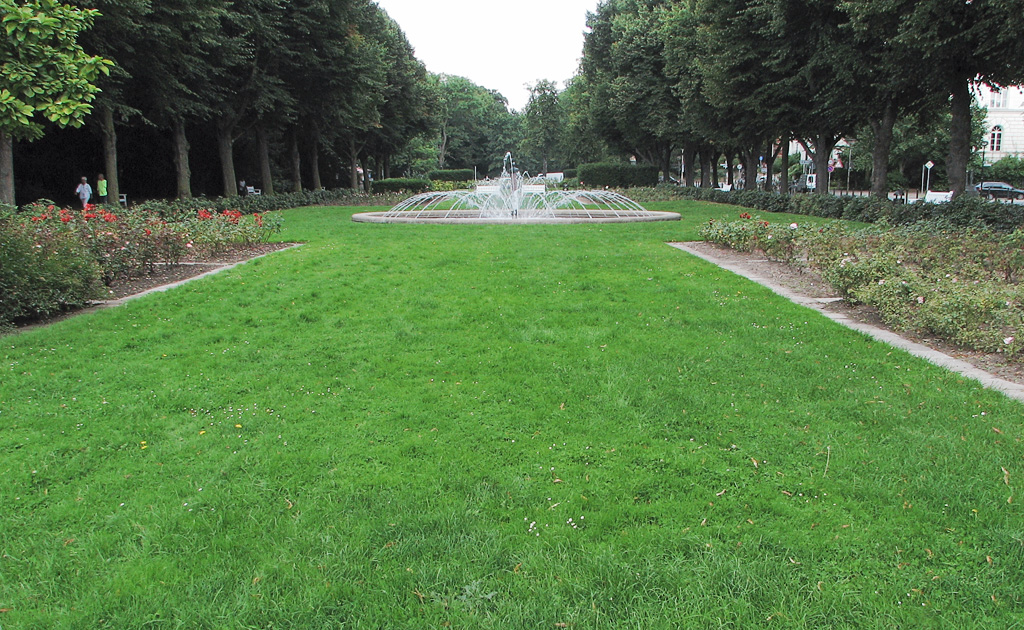 Beschreibung: Der Rosengarten in Rostock / Germany Fotograf: Darkone, 17. August 2005